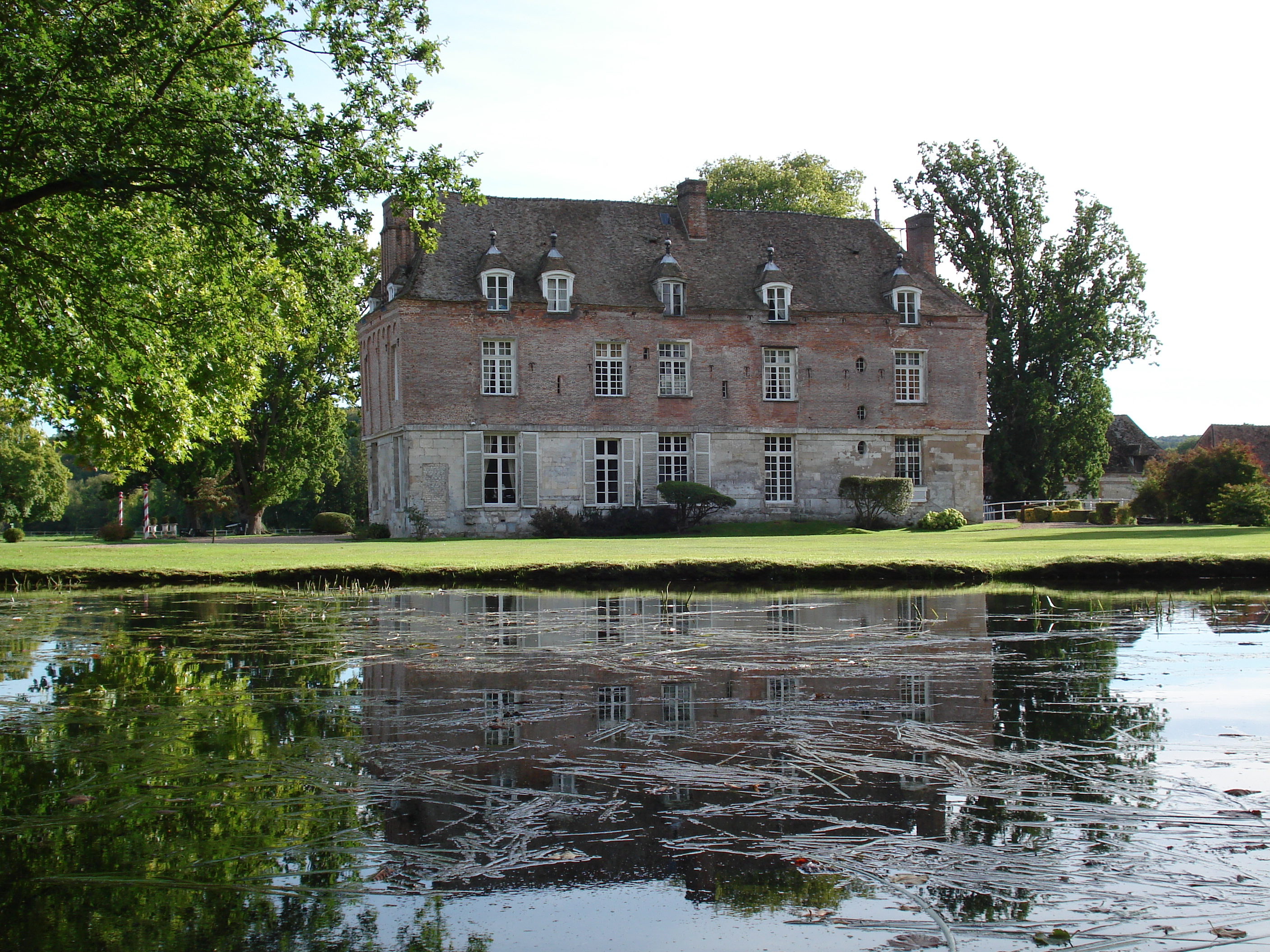 Manoir d'Heudreville-sur-Eure et sa pièce d'eau